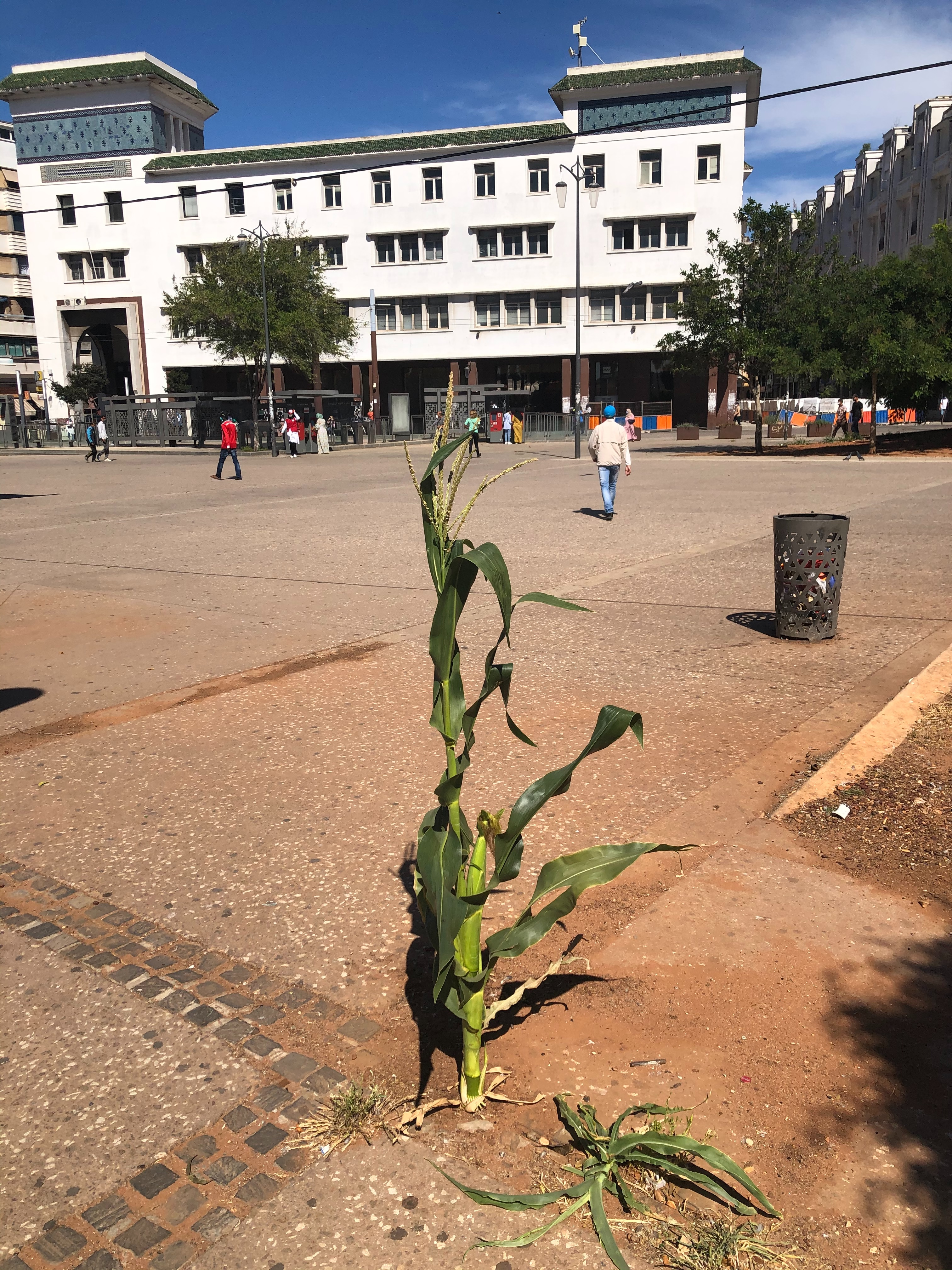 الدار البيضاء في زمن كوفيد 19